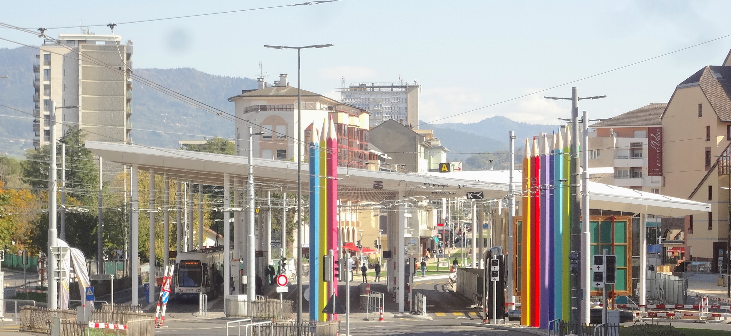 Douane de Moillesulaz, nouveau bâtiment en lien avec l'extension de la ligne de tramway jusqu'à Annemasse. Nouvelle ligne 17 dès le 15 décembre 2019.